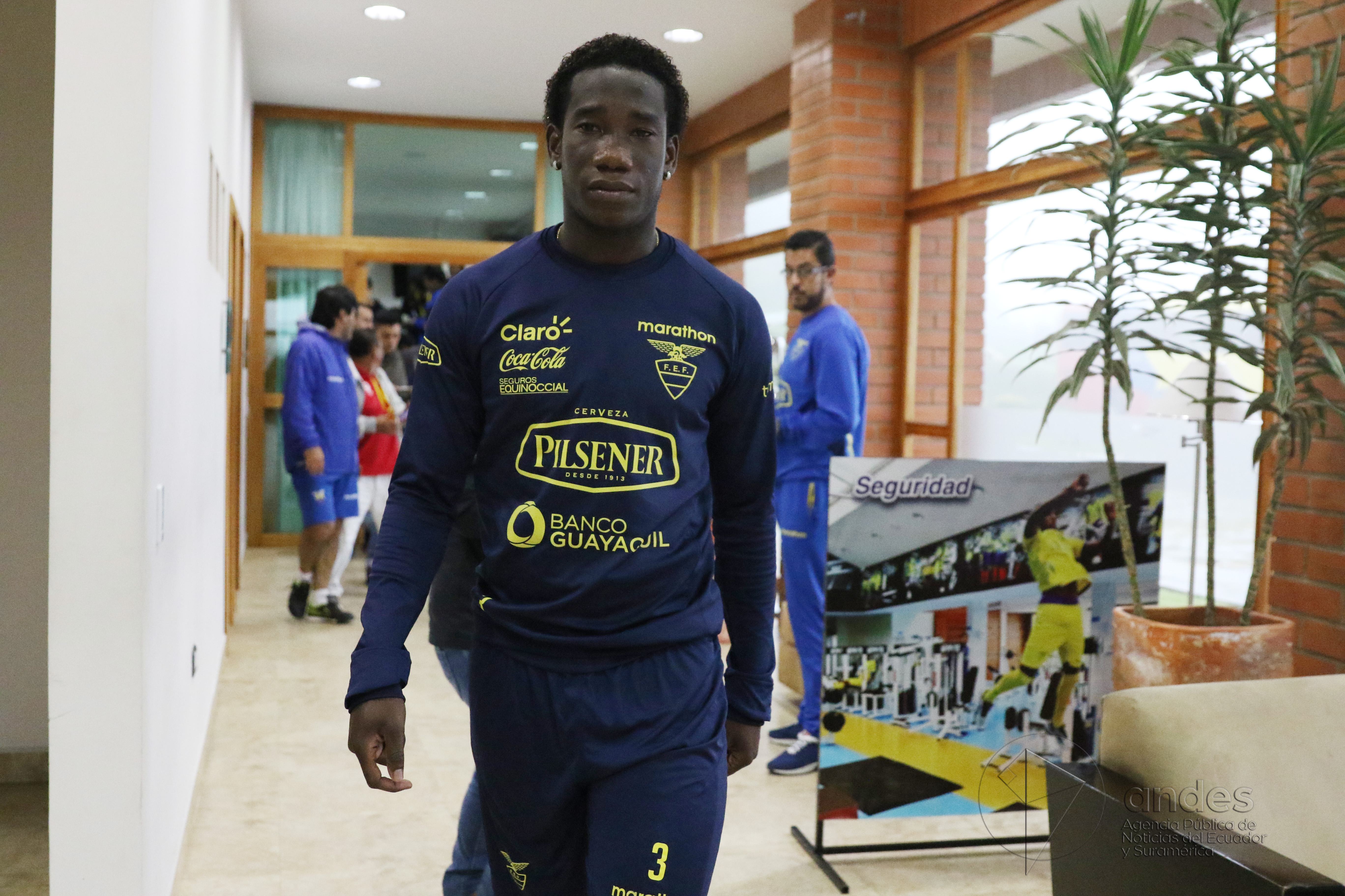 Quito, 24 de marzo de 2017 (Andes).- Luis Caicedo, seleccionado de la Tricolor hace un análisis de lo que será el partido frente a Colombia el próximo martes 28 de marzo en el estadio Olímpico Atahualpa. ANDES/Micaela Ayala V.